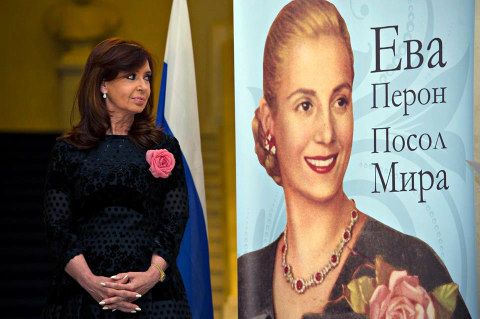 Moscú, 22 de abril de 2015.- La presidenta Cristina Fernández de Kirchner recorrió la muestra "Evita: Embajadora de la Paz" que se expone a partir de hoy en el Museo Estatal Histórico de Moscú. Cristina Fernández de Kirchner fue recibida por la ministra de Cultura, Teresa Parodi, y su par ruso, Vladimir Medinsky, quien dio la bienvenida y remarcó que “Evita vive en el recuerdo del pueblo" y que "sus ideas y sus obras viven hasta la actualidad”. Foto: Andam / Telam